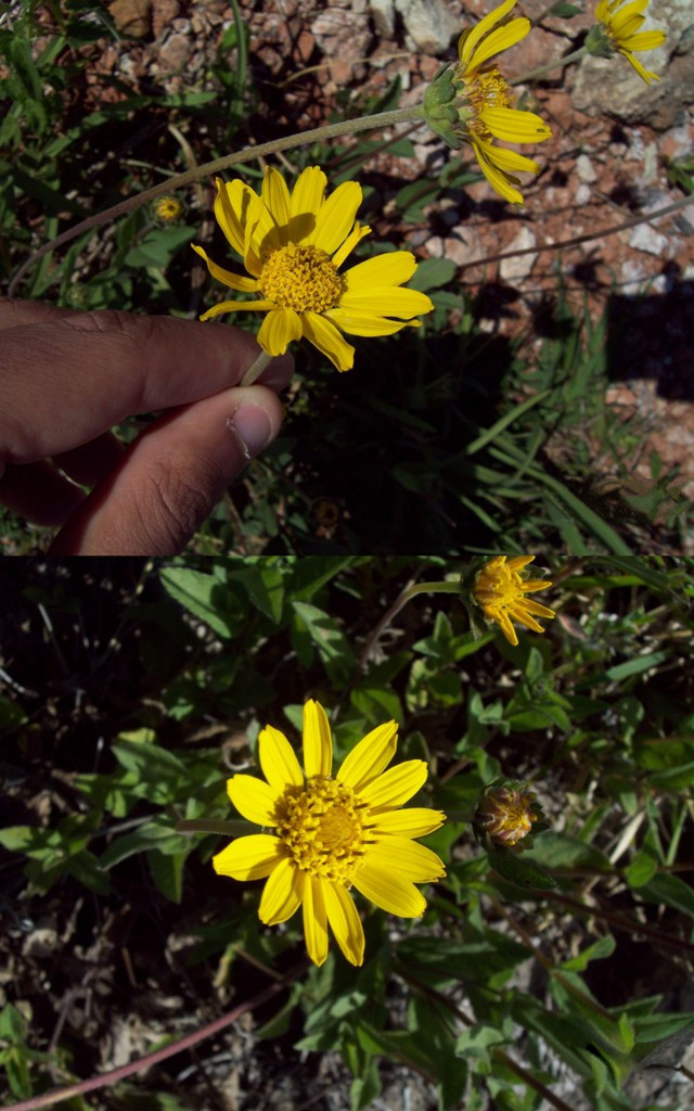 Angelphytum grisebachii. Asteraceae. Fotos tomadas en suelo arenoso al margen de Cañada de las Pajas y entre gramíneas al margen de la Ruta 55 en Palmar, departamento de Soriano, Uruguay.